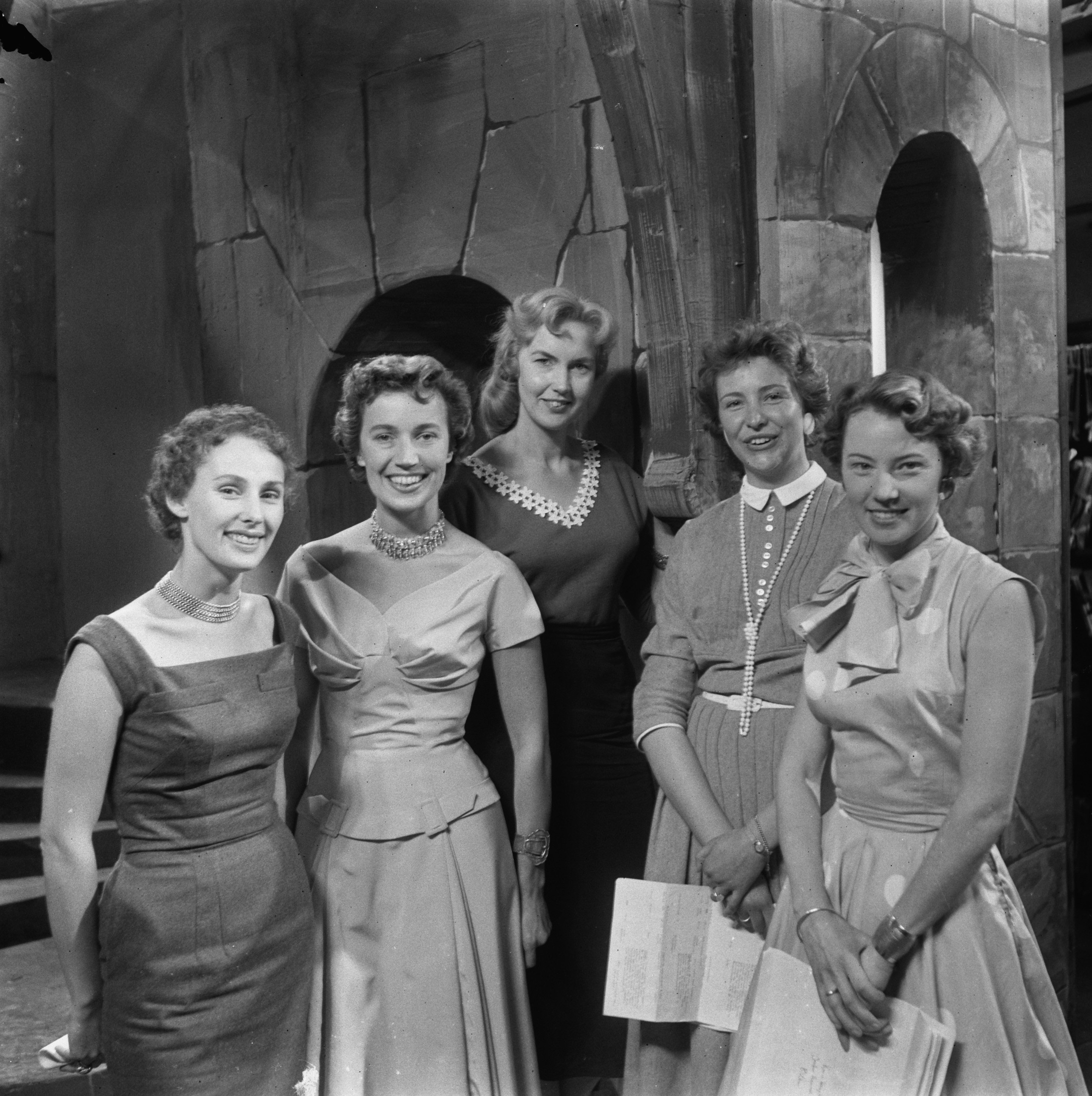 Collectie / Archief : Fotocollectie Anefo Reportage / Serie : [ onbekend ] Beschrijving : Vijf jaar televisiestichting, de omroepsters, vlnr Tanja Koen (NCRV), Hannie Lips (KRO), Verti Dixon (VPRO), Ageeth Scherphuis (AVRO) en Karin Kraaykamp (VARA) Datum : 2 oktober 1956 Locatie : Bussum, Noord-Holland Trefwoorden : groepsportretten, omroepen, omroepsters, televisie Persoonsnaam : Dixon, Verti, Koen, Tanja, Kraaykamp, Karin, Lips, Hannie, Scherphuis, Ageeth Fotograaf : Noske, J.D. / Anefo Auteursrechthebbende : Nationaal Archief Materiaalsoort : Negatief (zwart/wit) Nummer archiefinventaris : bekijk toegang 2.24.01.03 Bestanddeelnummer : 908-0414